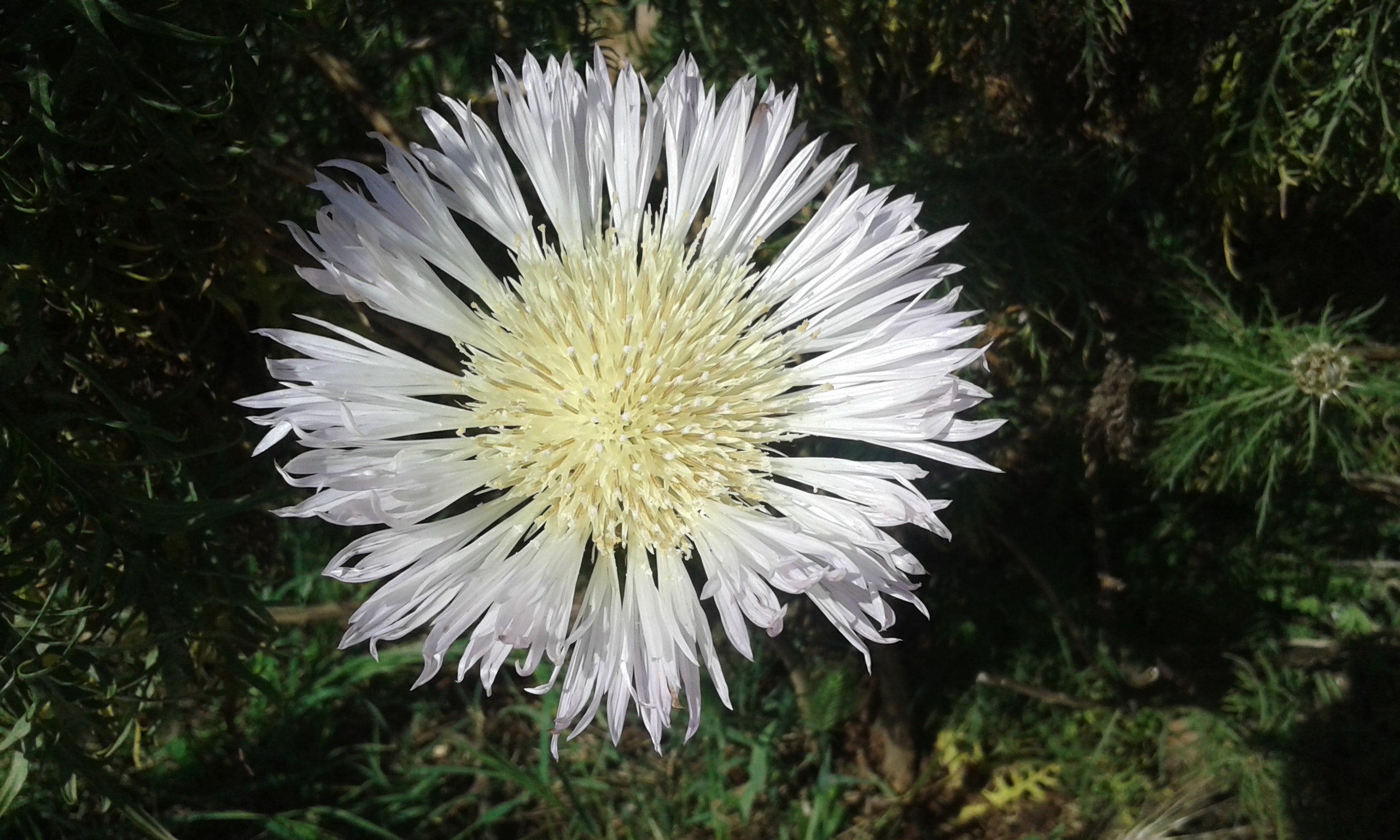 Flor de la planta Centaurea cachinalensis o Flor de minero en el Jardín Botánico de Barcelona.